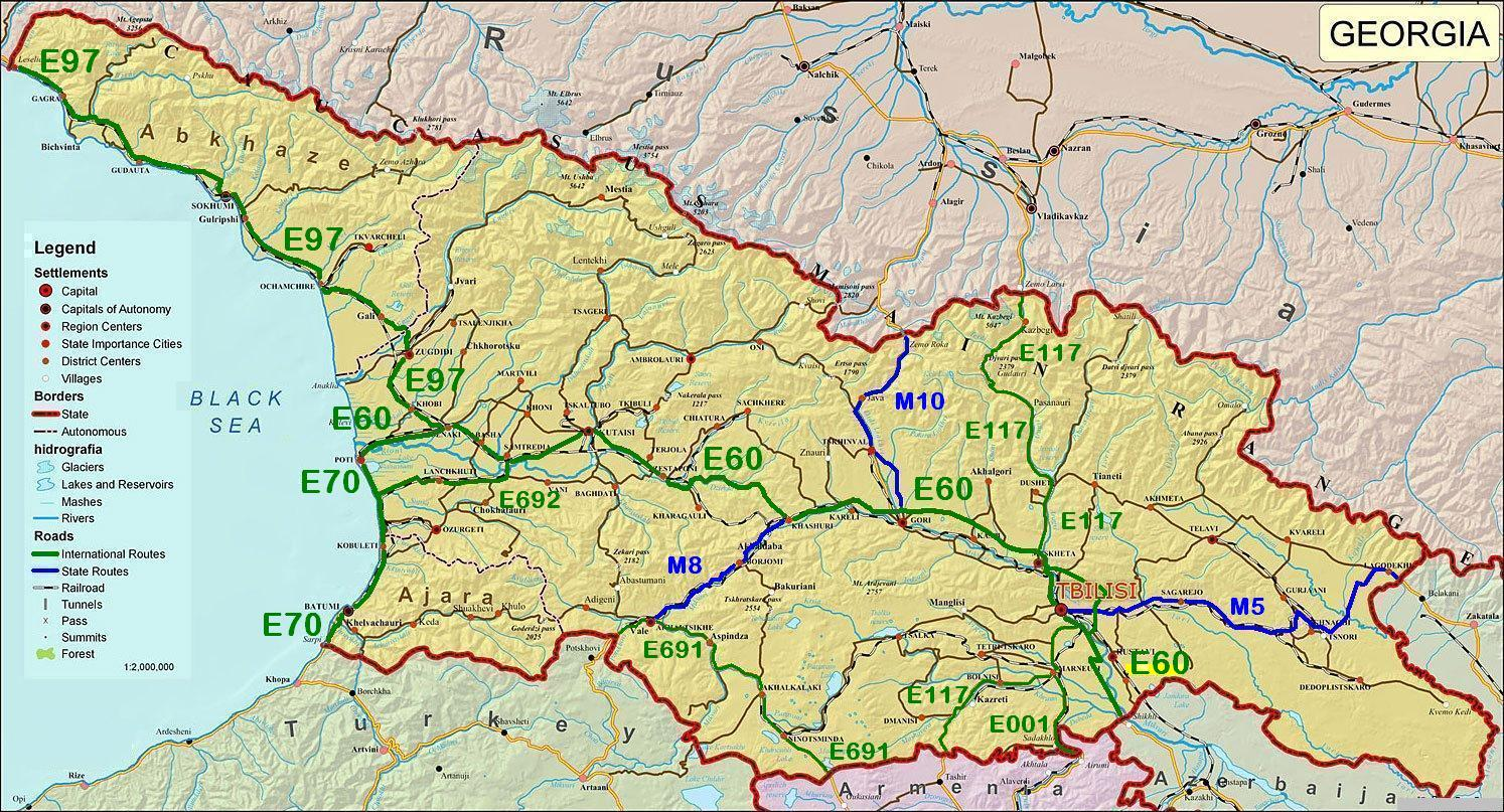 საქართველოს საერთაშორისო საავტომობილო მაგისტრალები